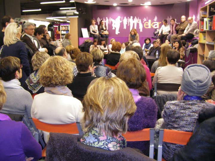 Bahiyyih Nakhjavaniren "La mujer que leía demasiado" liburuaren aurkezpena Gasteizko Elkar liburudendan.